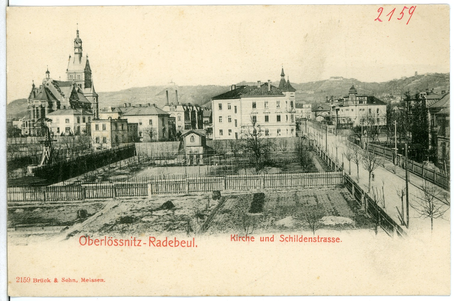 Radebeul; Kirche und Schildenstraße This postcard is from publisher Brück & Sohn in Meißen ( postcard has a unique number 02159 and is available in a higher resolution at the publisher. This images was uploaded in a cooperation project between Wikipedians and the publisher.